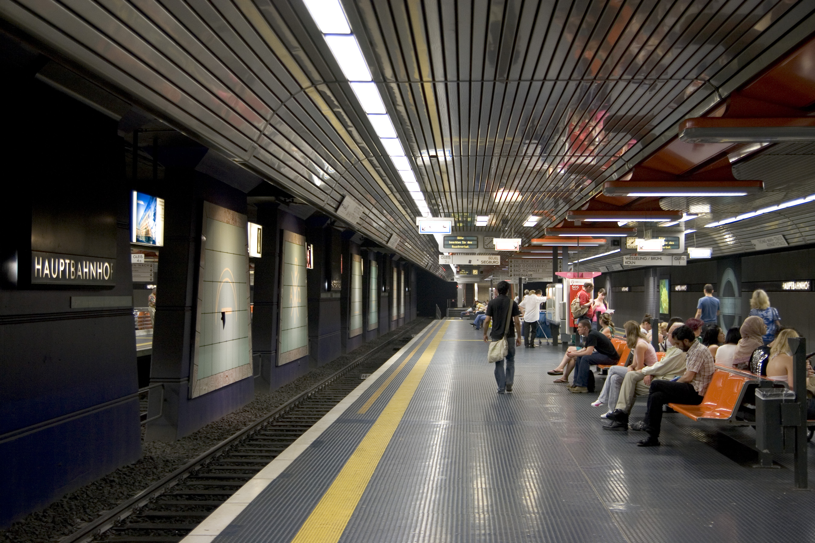 U-Bahnhof Hauptbahnhof, Bonn